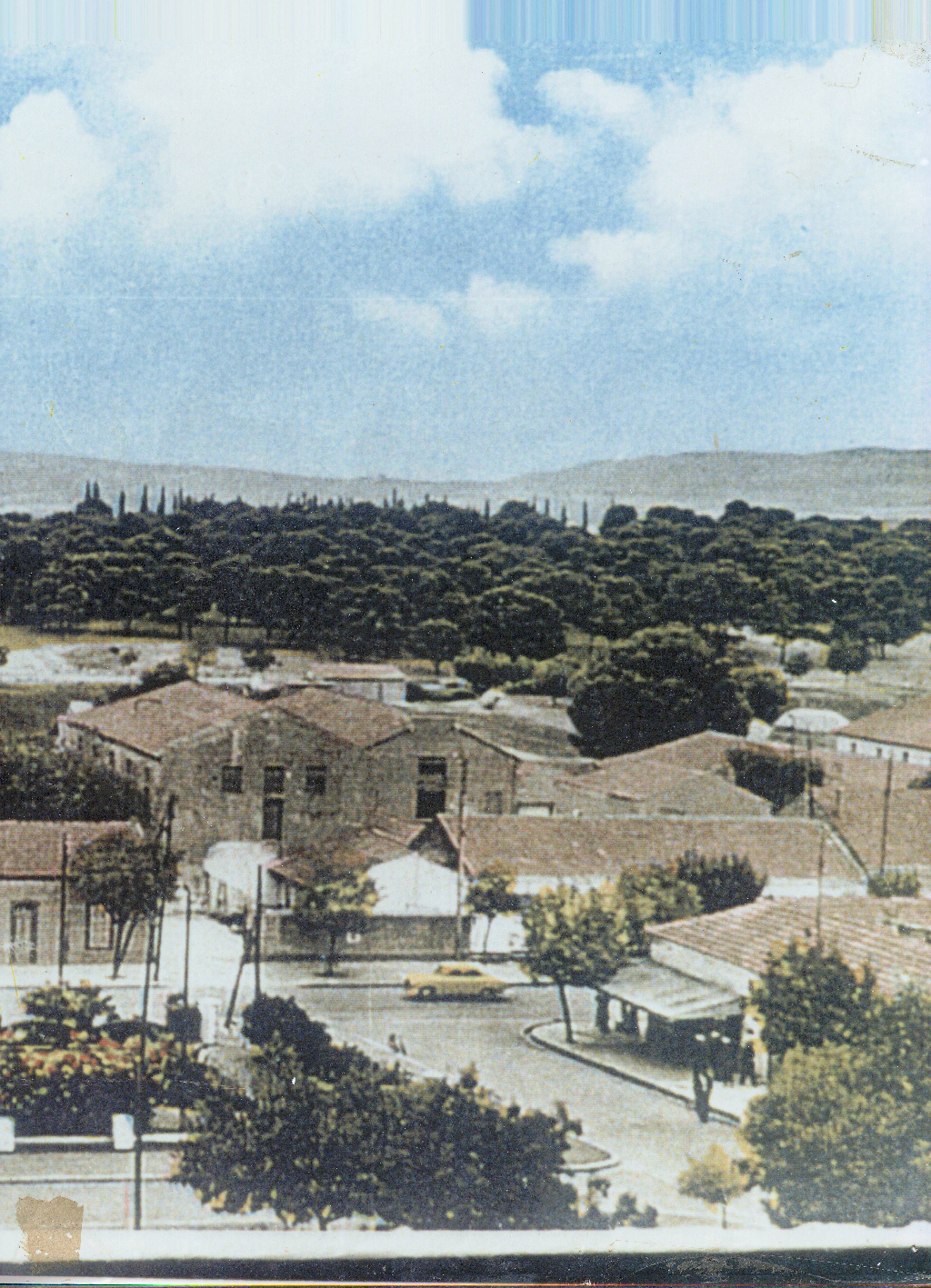 منظر عام لوسط المدينة أيام الاربعينات من القرن العشرين